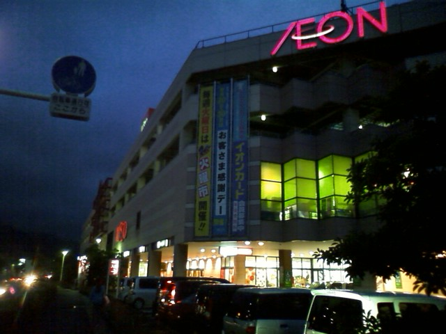 JUSCO 時津店